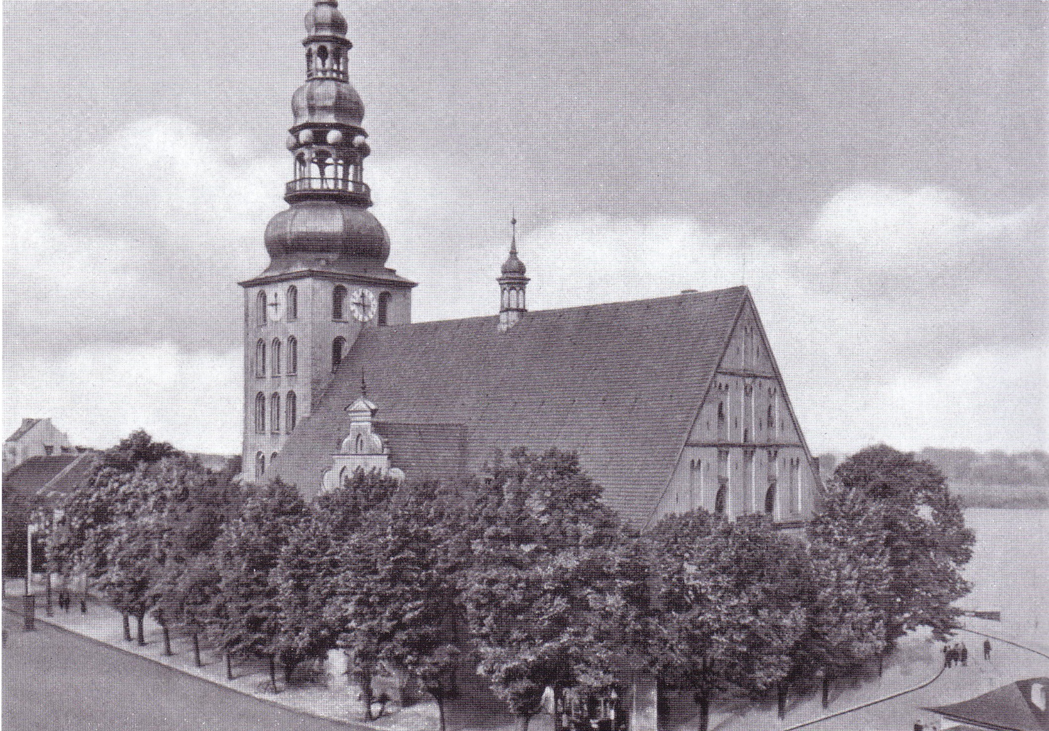 Fotografie der Deutschordenskirche in Tilsit